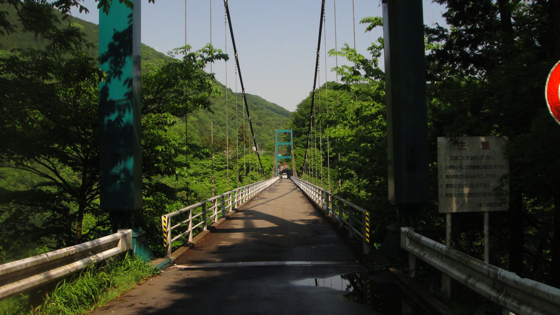 名手橋、神奈川県。